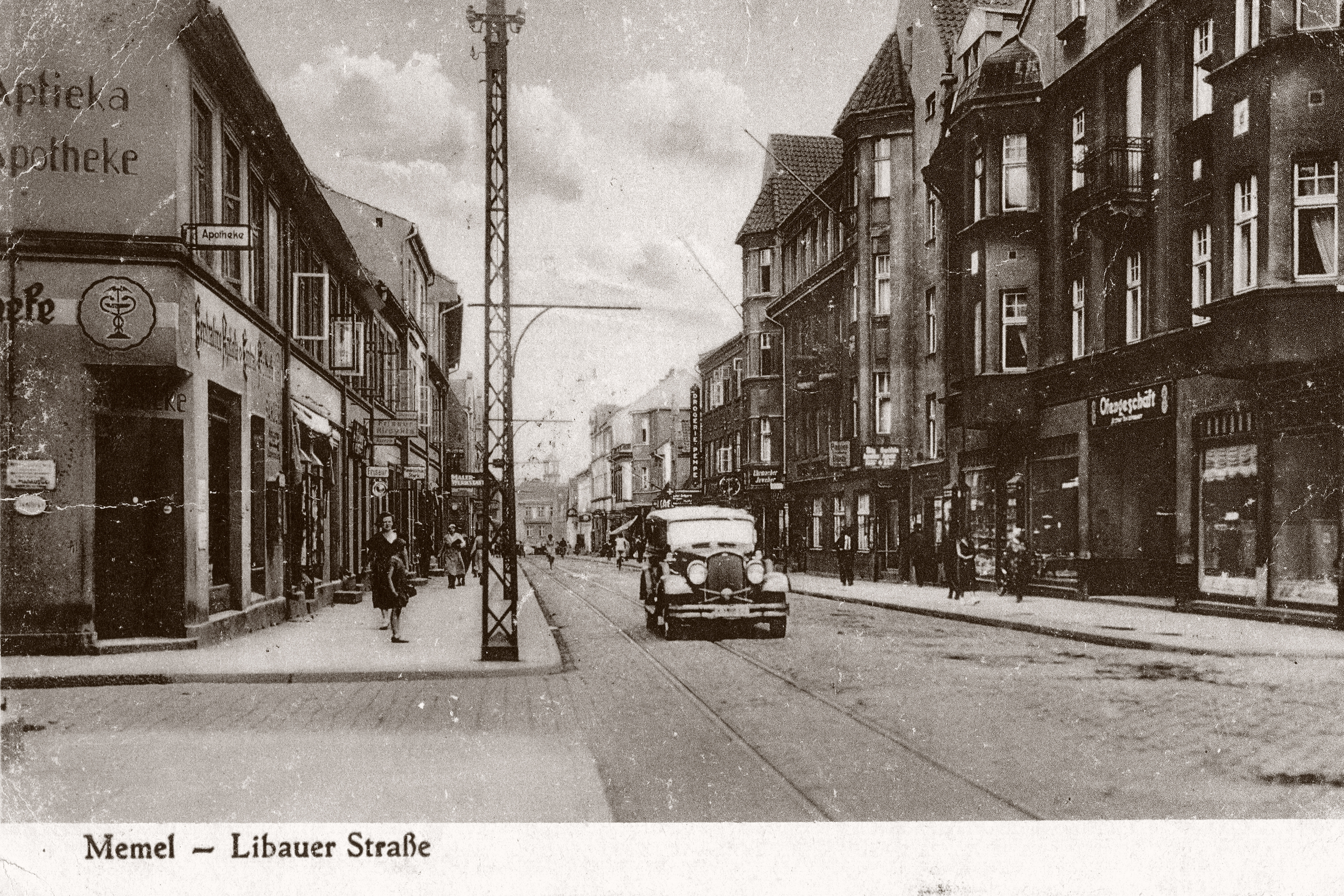 Ulice Libauer Straße (nynější Tiltų gatvė) v Memelu (dnes Klaipėda). Rohový dům vlevo je druhá nejstarší lékárna v Klaipėdě Juodojo erelio vaistinė (lékárna U Černého orla), založená 19 let po založení nejstarší jménem Žalioji (Zelená; o blok severněji v téže ulici), t. j. r 1696 na jiném místě. Na toto místo přenesana r. 1768. Dnes (2013) nejstarší fungující v Litvě vůbec, ale brzy bude zlikvidována. Pohled od jihovýchodu